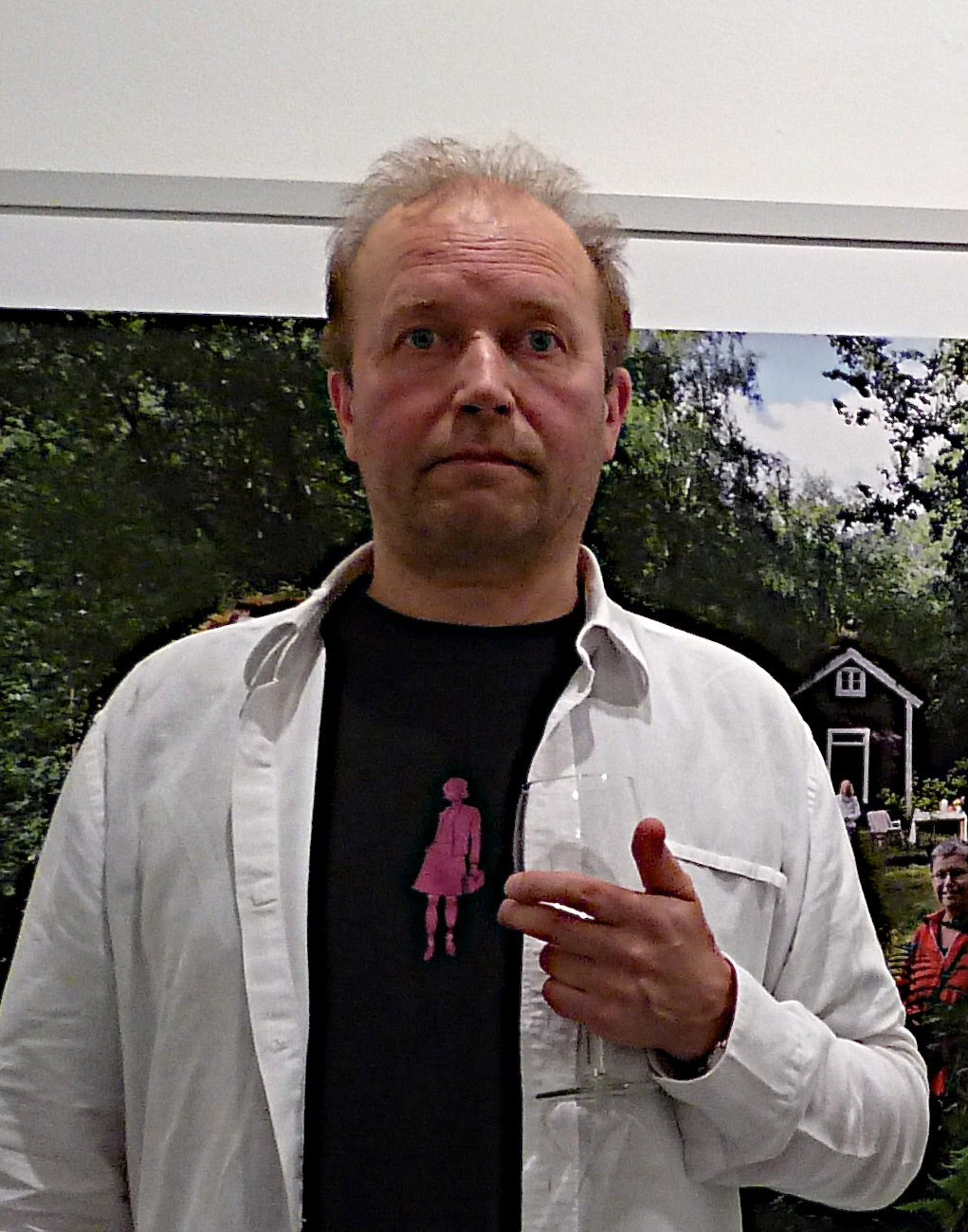 Oddleiv Apneseth